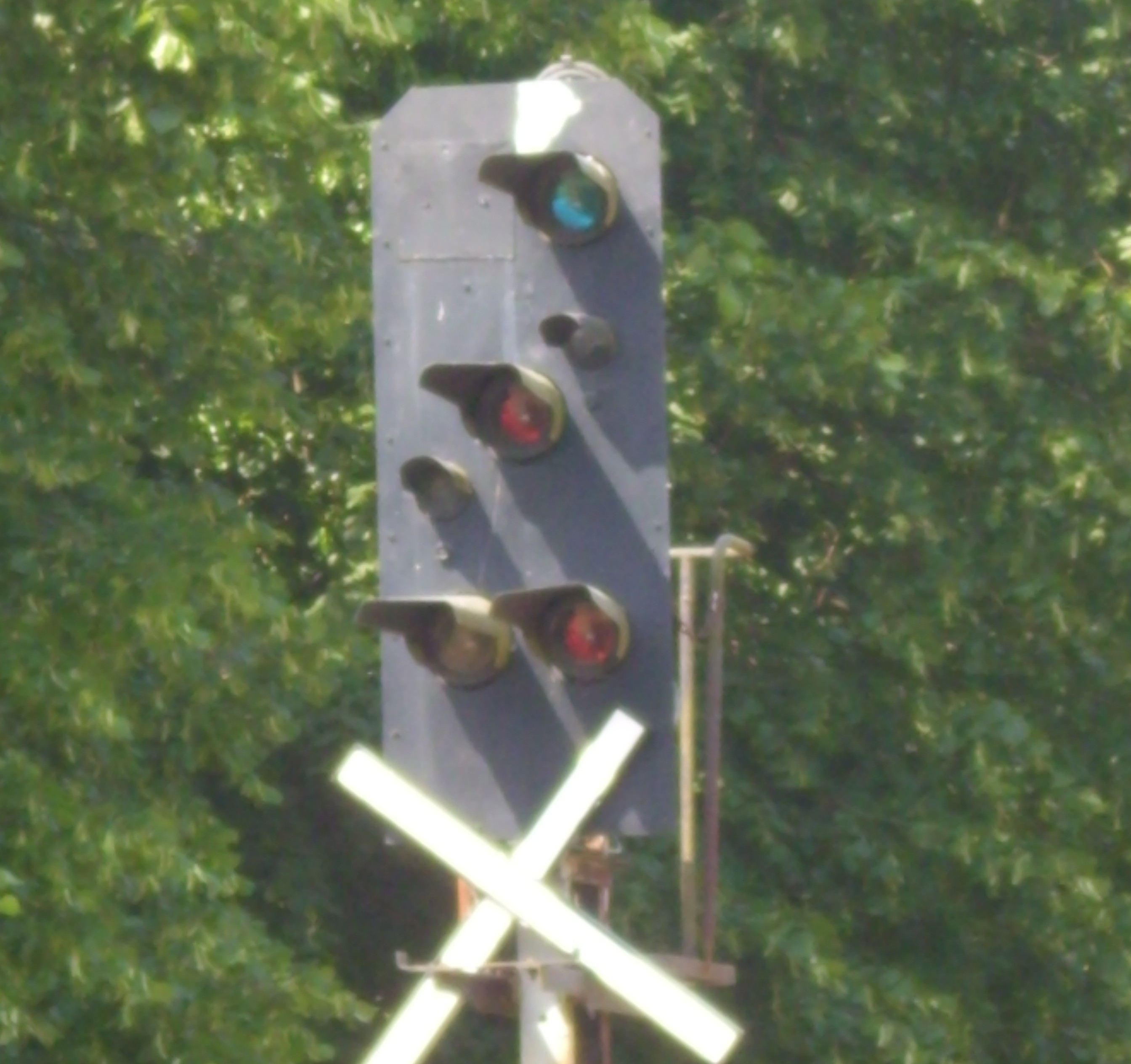 Hl-Signal des Bahnhof Arendsee (Altm)